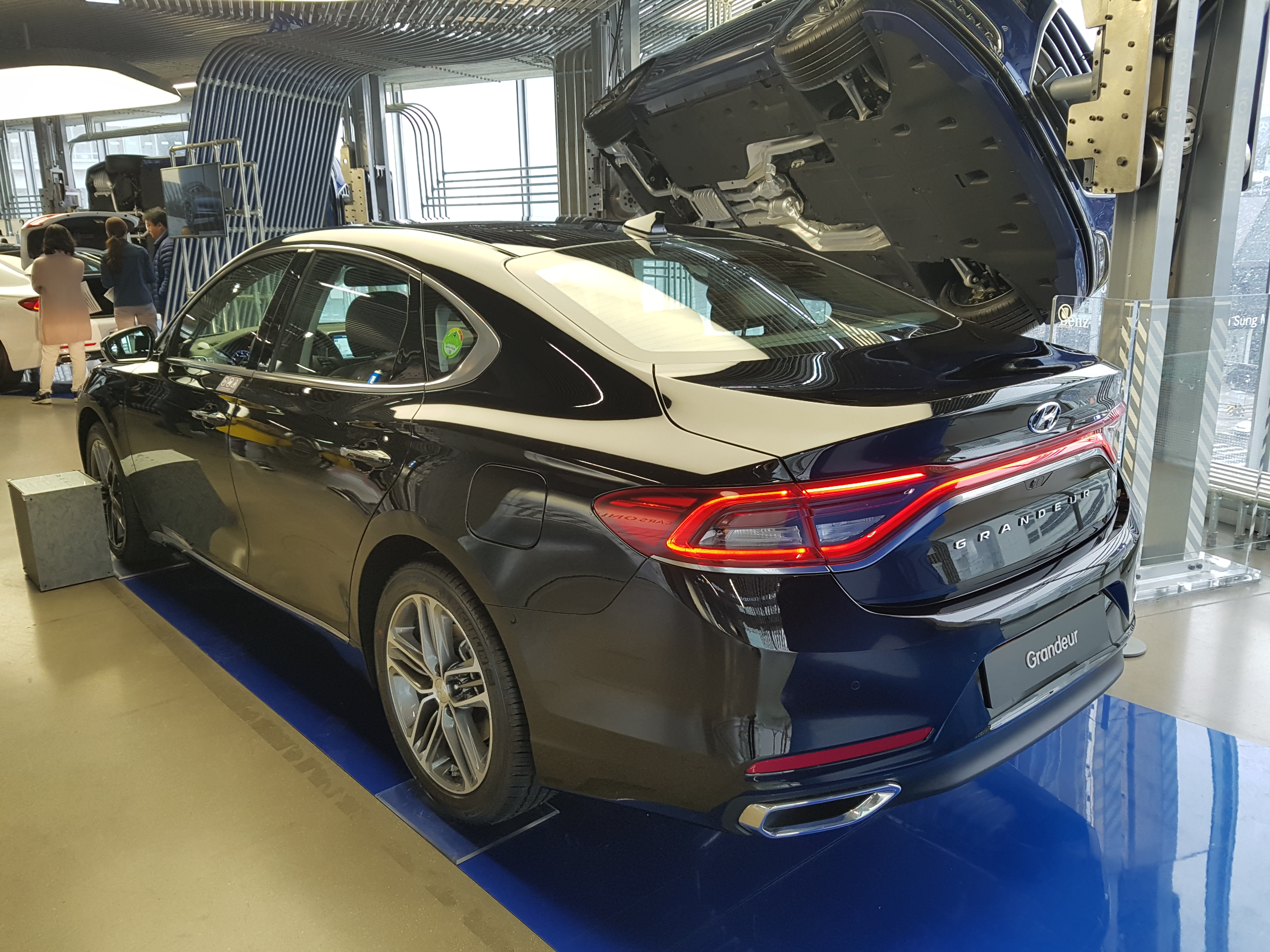 현대 그랜저(6세대) 후측면